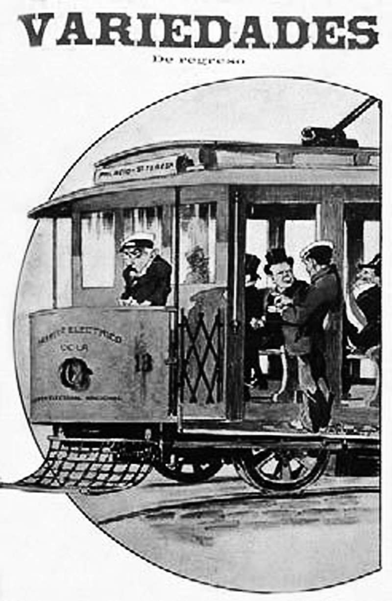 Esta caricatura fue el fin de su primer gobierno de Jose Pardo (1907)